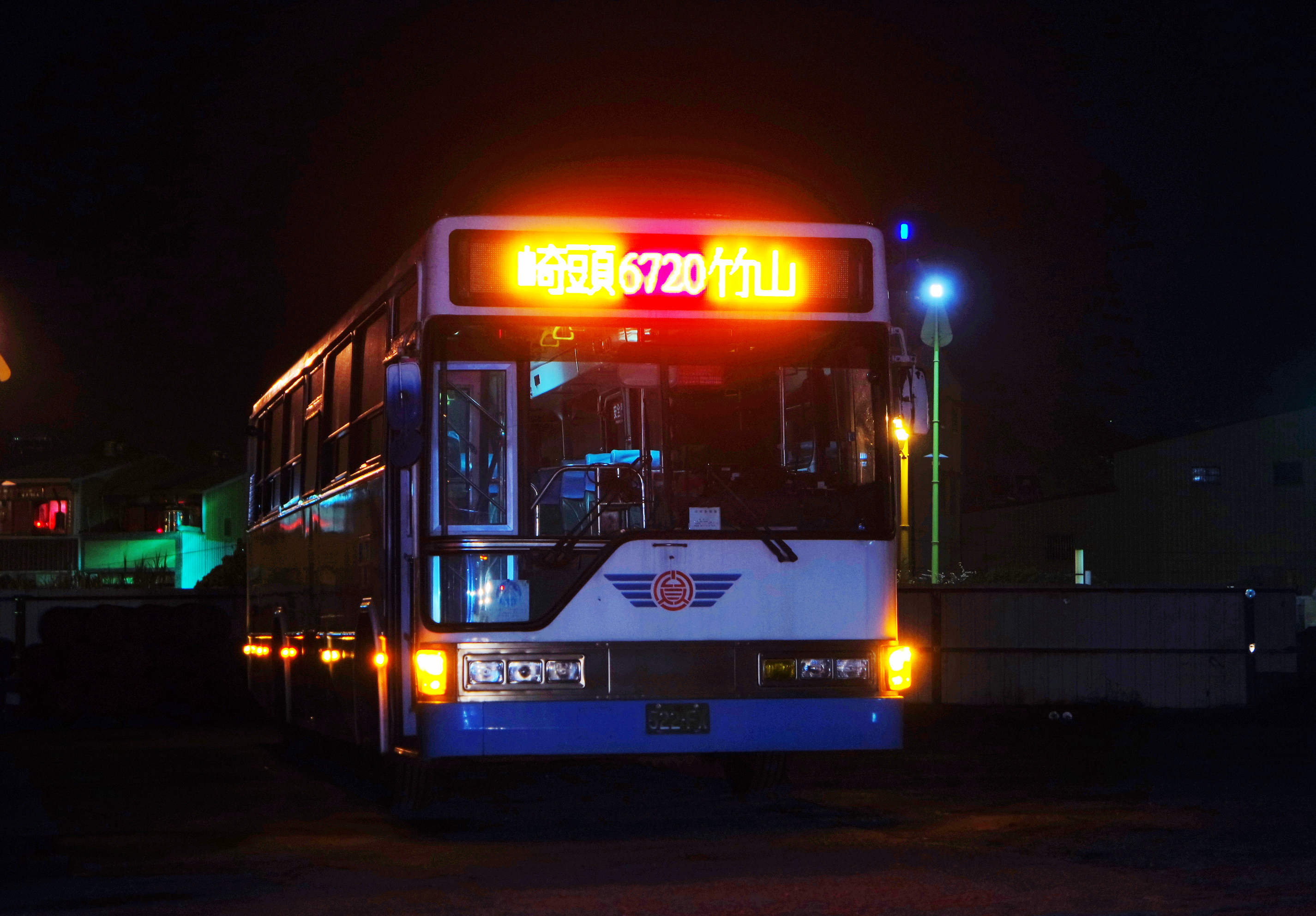 中文（台灣）: 員林客運 522-FX